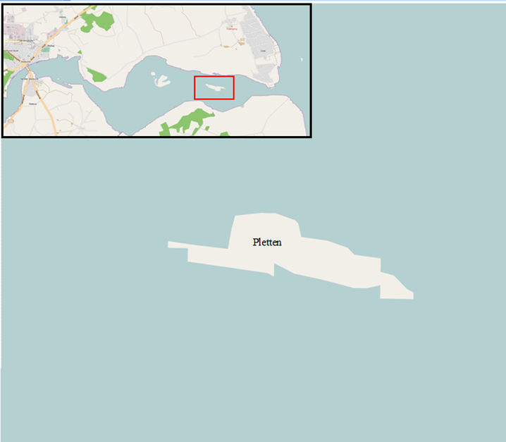 Kort over Pletten This map may be incomplete, and may contain errors. Don't rely solely on it for navigation.